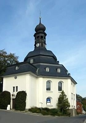 Außenansicht der Rundkirche "Zum Friedefüsten" Object location 50° 21′ 27.75″ N, 12° 28′ 1.53″ E This and other images at their locations on: Google Maps - Google Earth - OpenStreetMap - Proximityrama(Info)